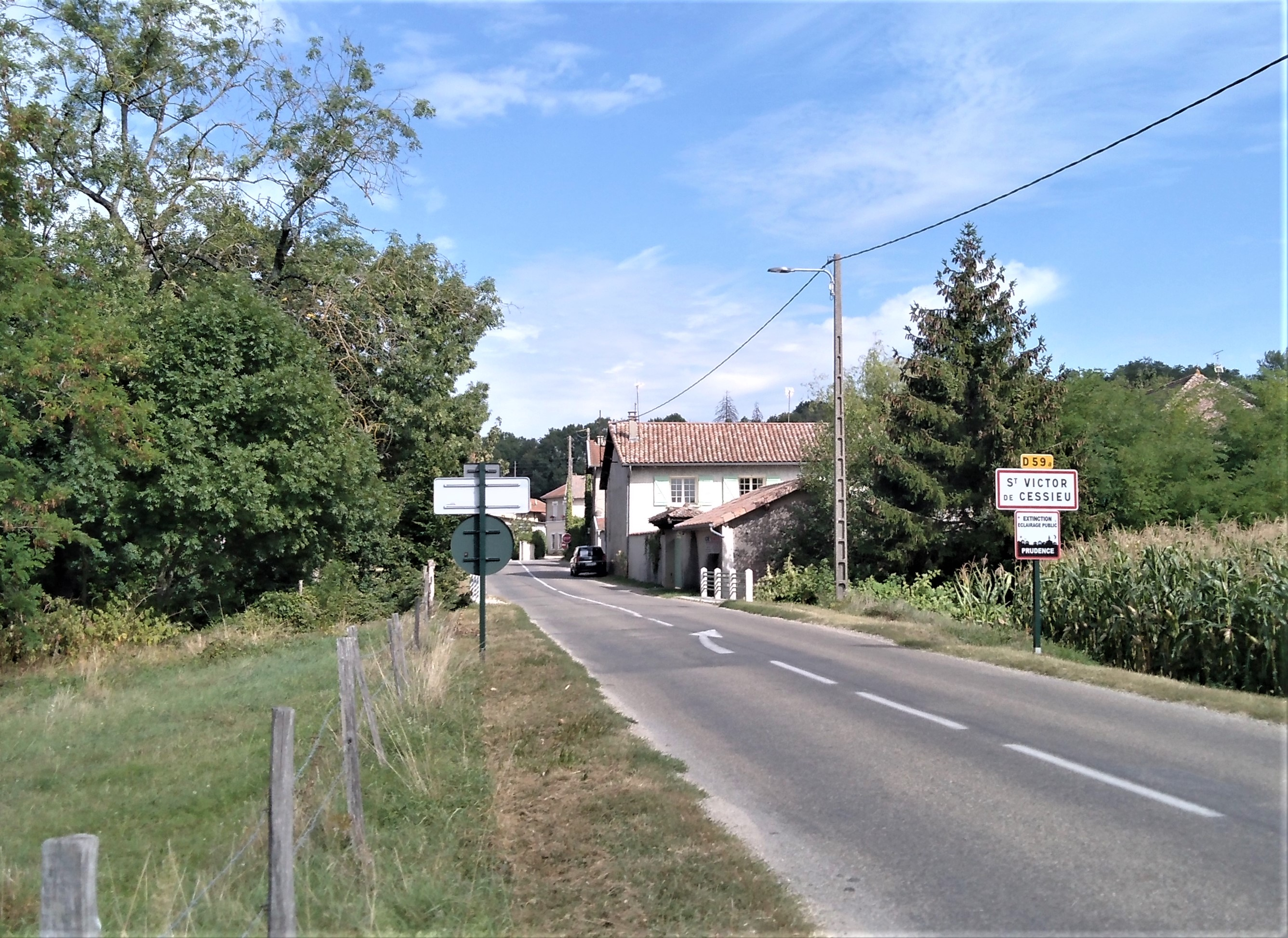 St Victor de Cessieu (entrée du village) en septembre 2019